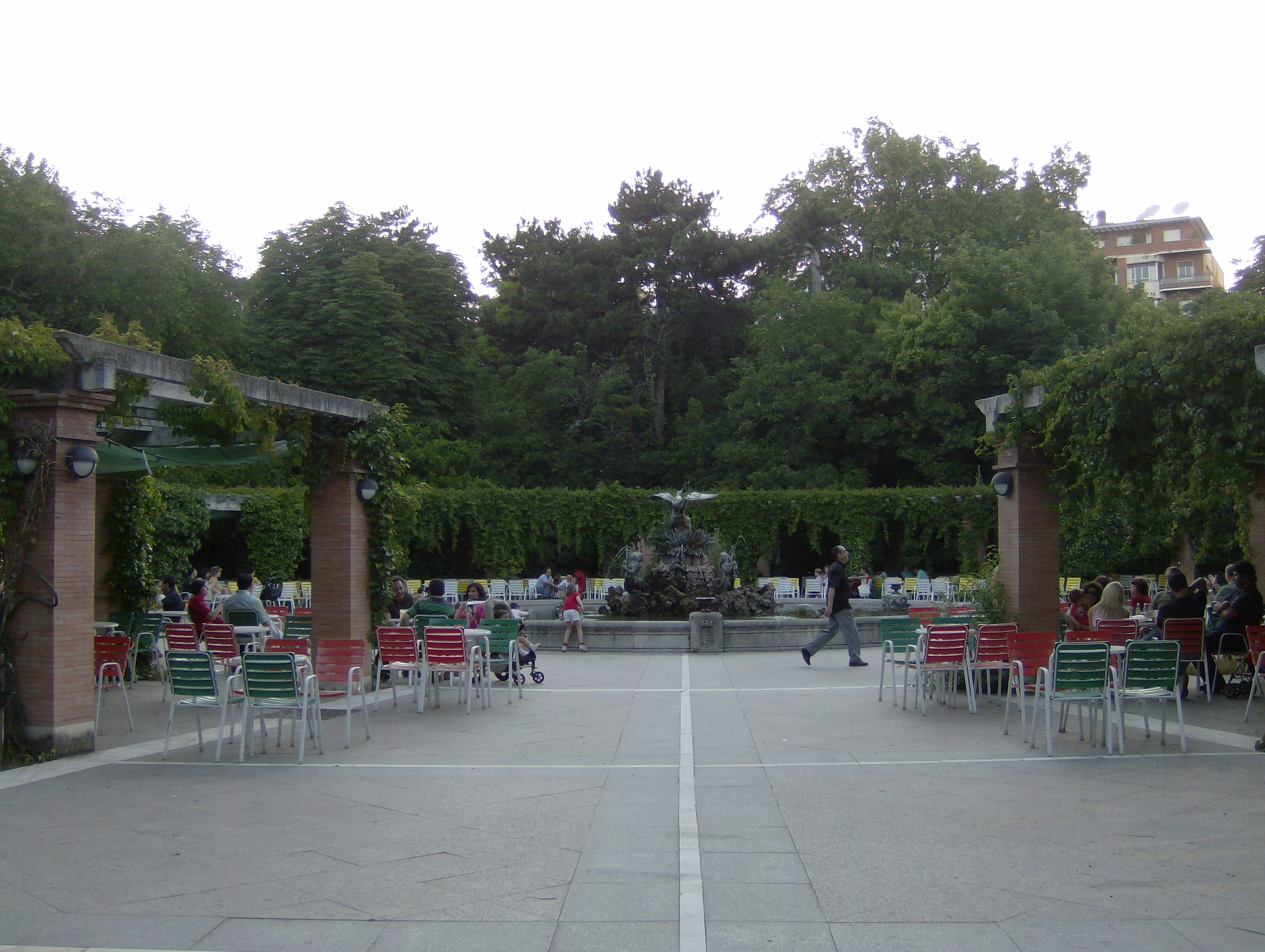 Pergola del Campo GRande